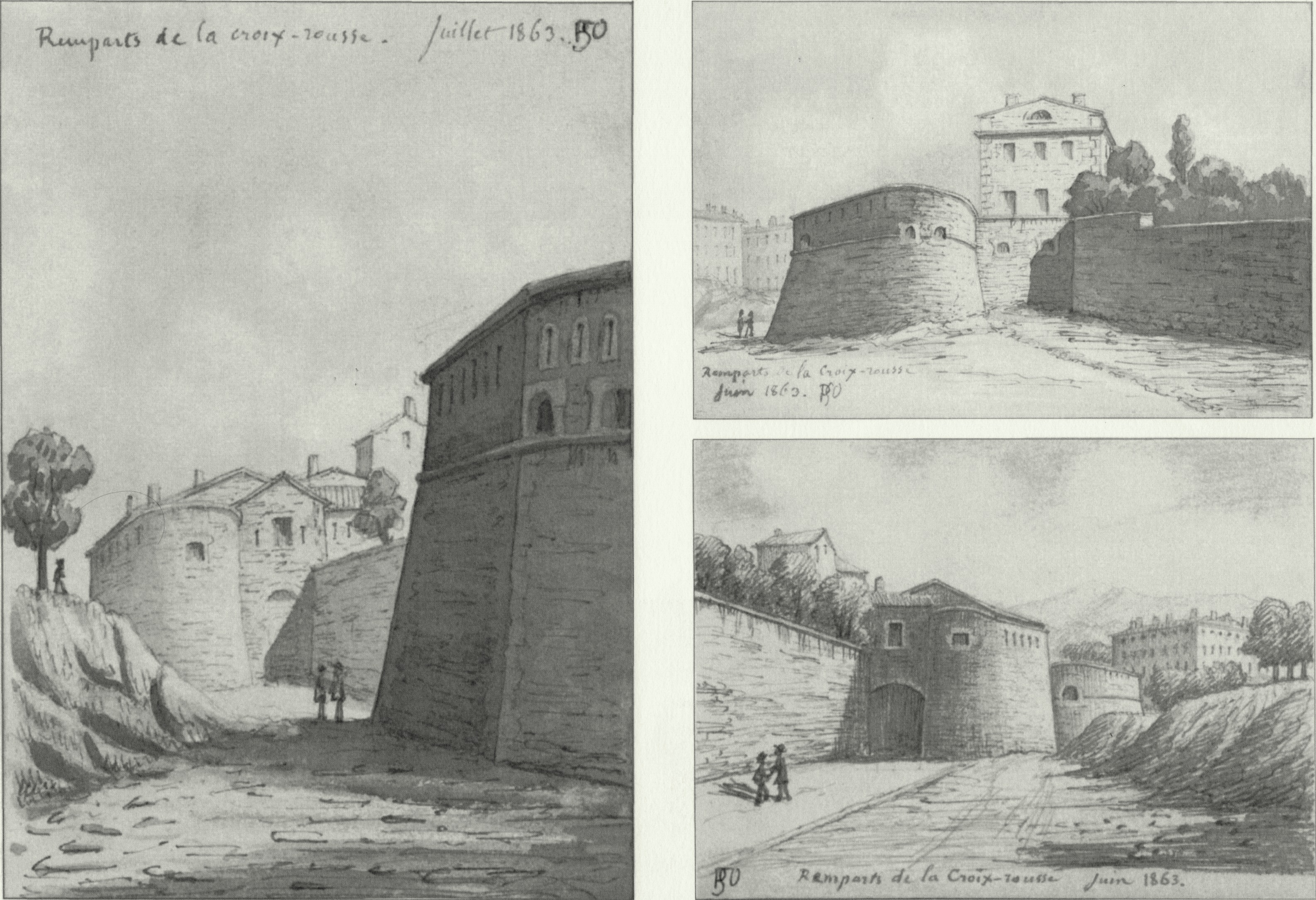 Représentation de 3 vues dessinées de la muraille de la Croix-Rousse à Lyon en 1863, qui est détruite aujourd'hui.